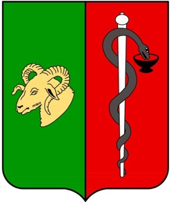 Герб города Евпатории, утверждённый 20 июля 2018 г.